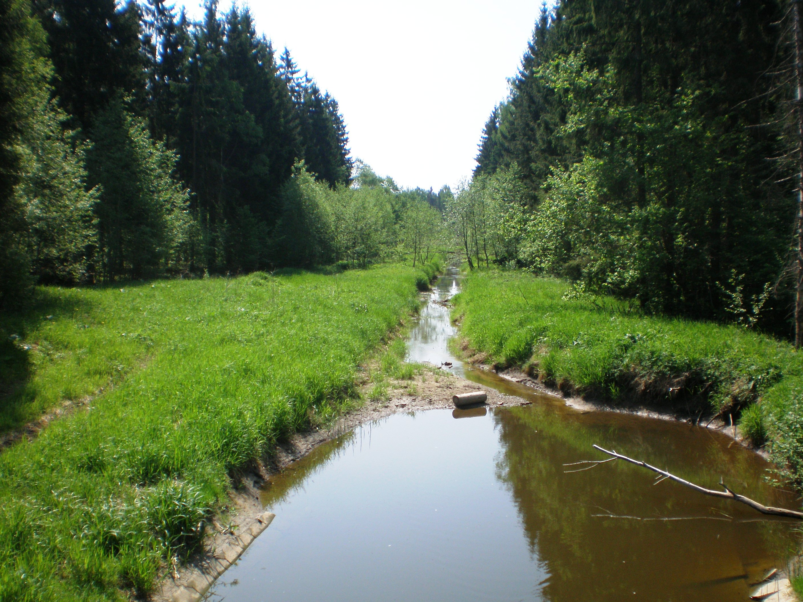 Jaugila Krakių miške, Kėdainių raj.